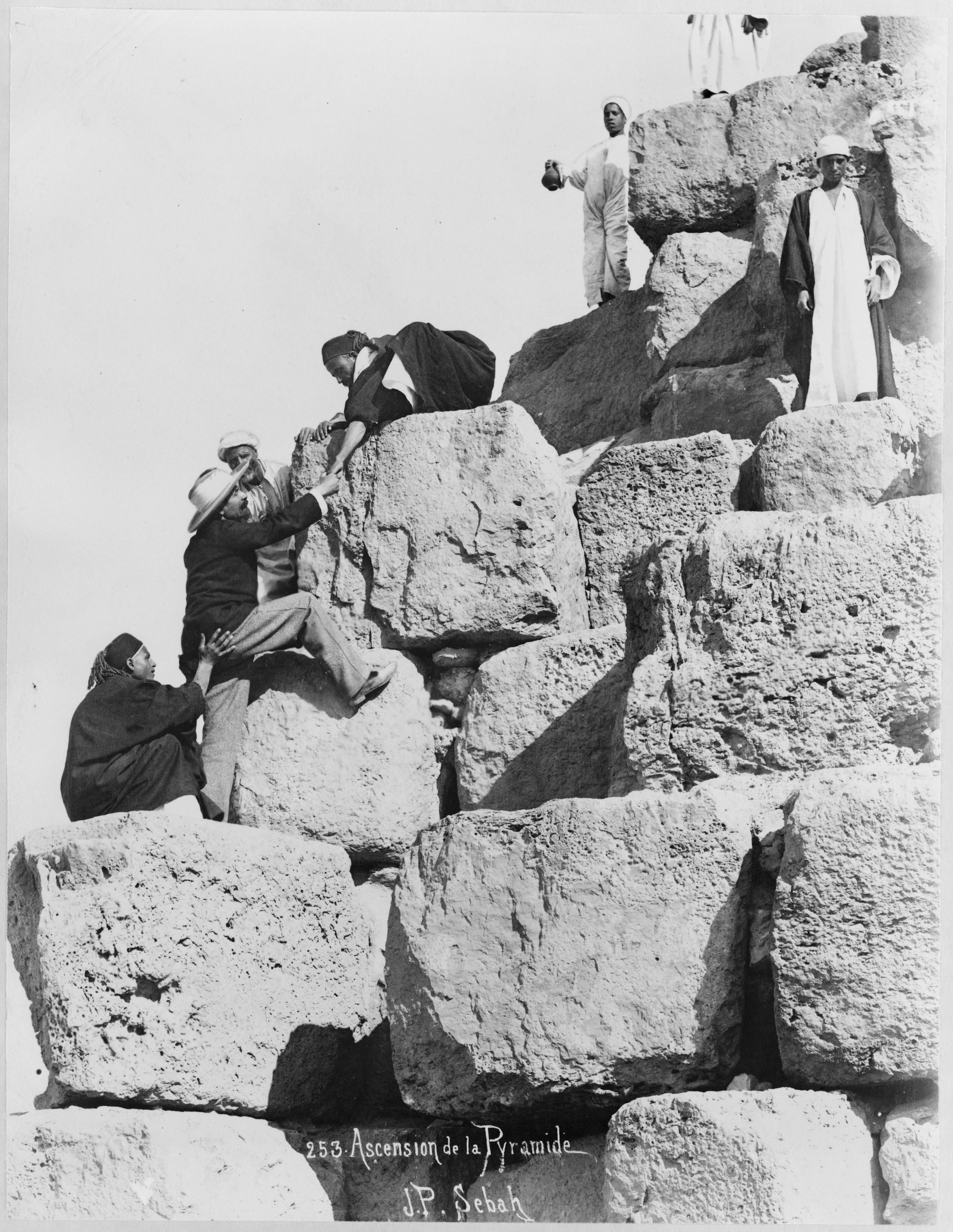 Ein Reisender in europäischer Kleidung steigt mit Hilfe Einheimischer auf die Cheops-Pyramide (Große Pyramide)